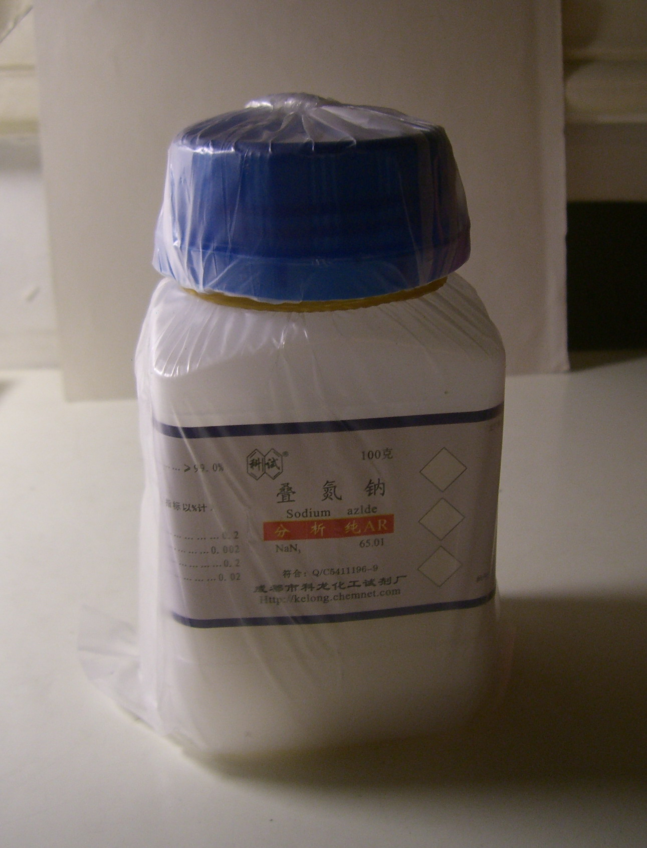 Sodium azide